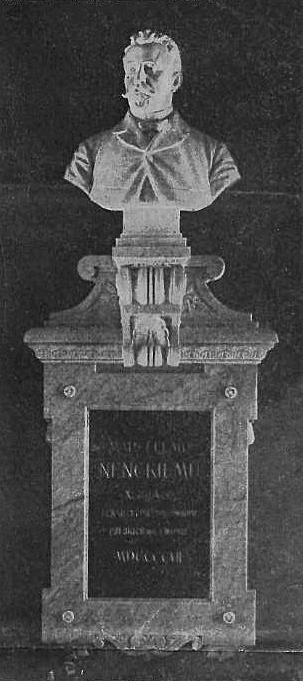 Pomnik-popiersie Marceli Nenckiego, autorstwa autorstwa rzeźbiarza Henryka Kunzeka, wmurowany w ścianie gmachu Instytutu Chemicznego Uniwersytetu Lwowskiego w 1907.